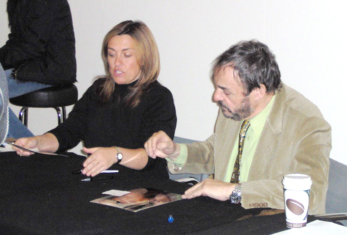 John Rhys-Davies during autograph session, Malmö, Sweden